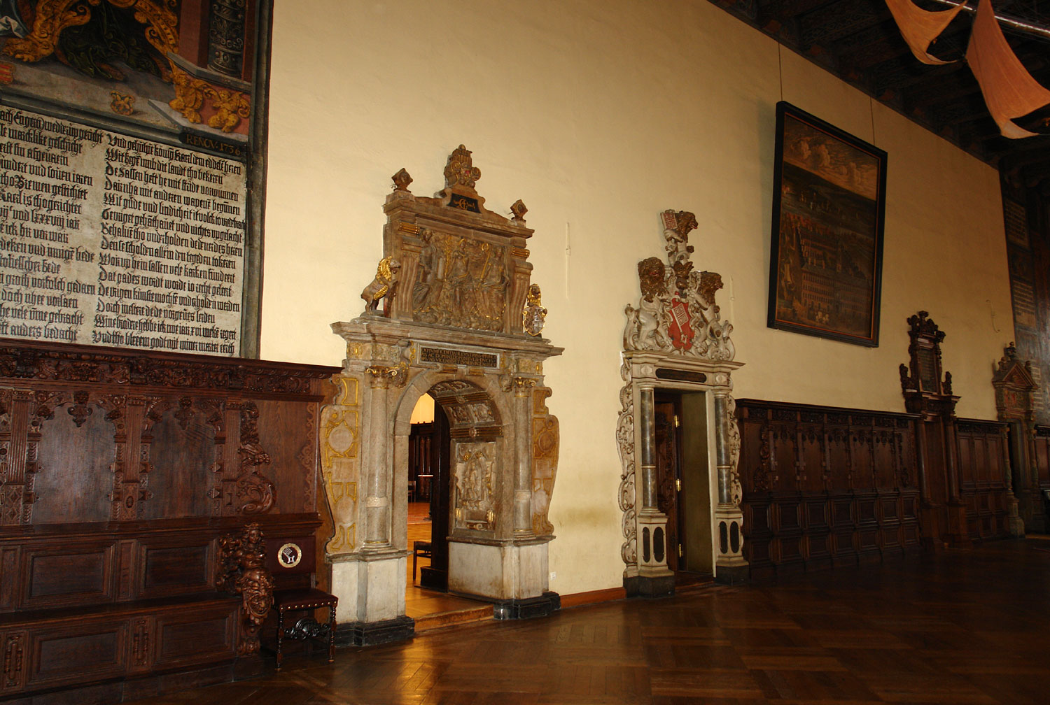 Rathaus in Bremen. Renaissance- und Barock-Portale in die Oberen Halle.